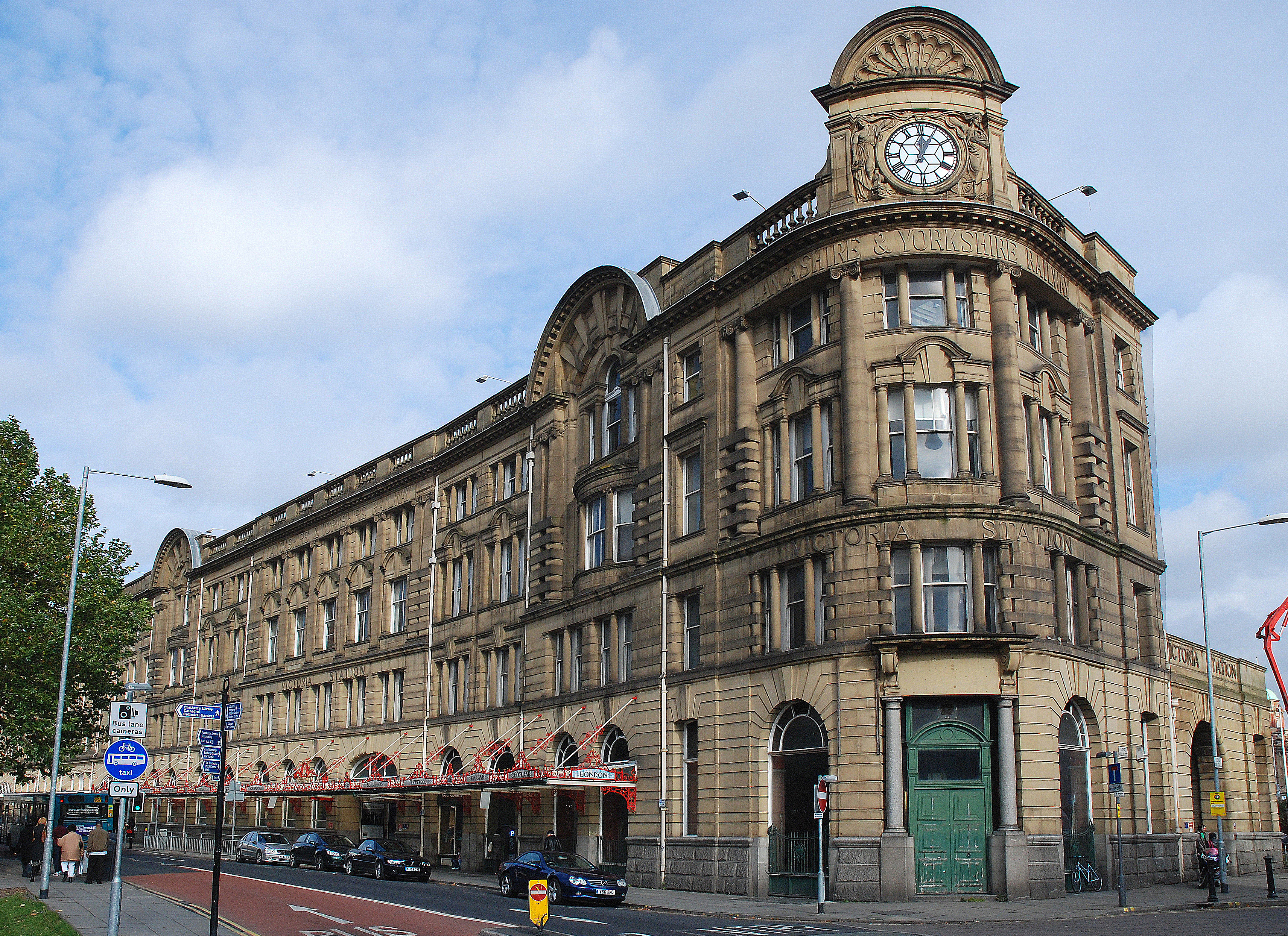 Station Manchester Victoria in Manchester, Engeland